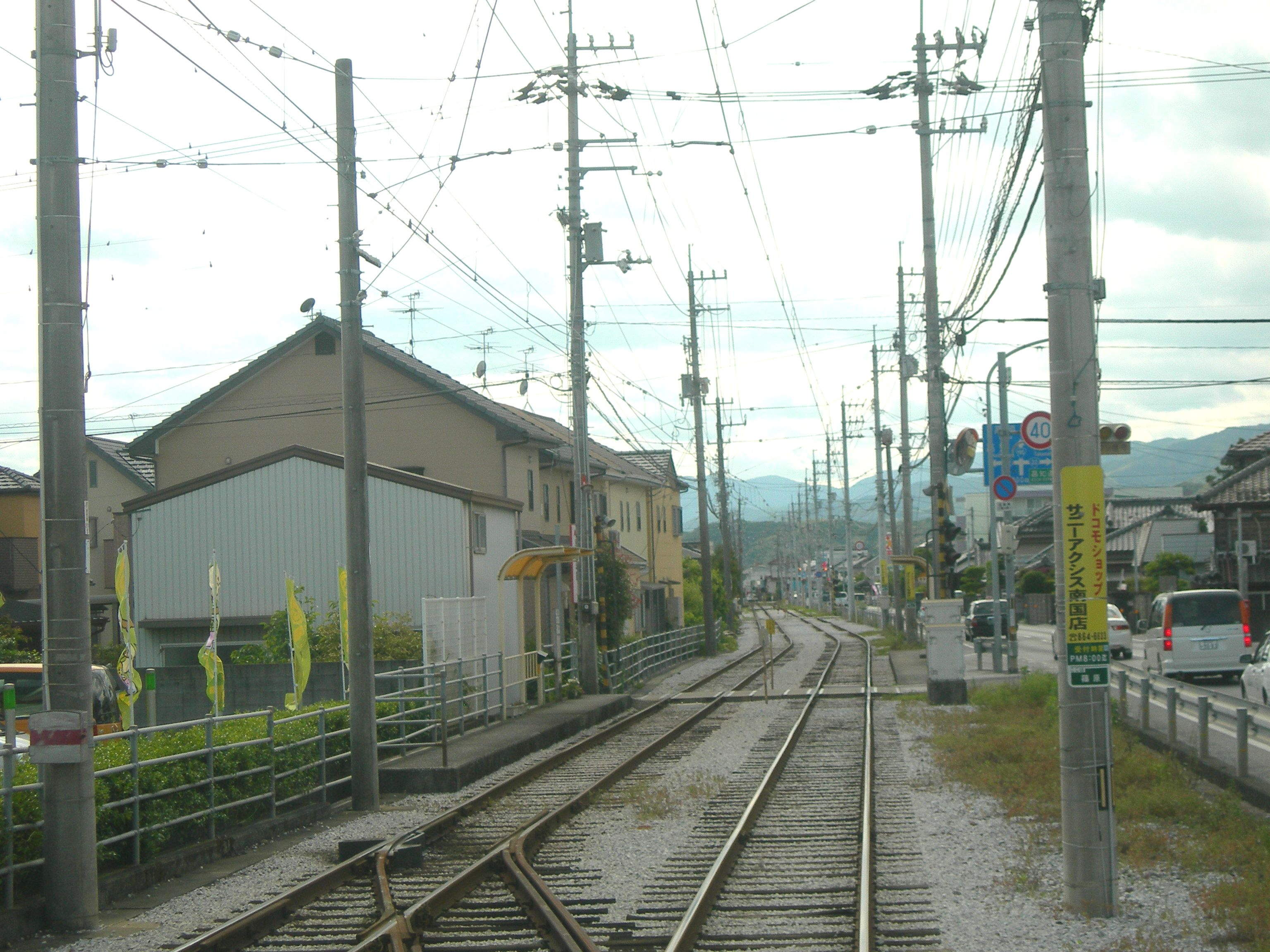 土佐電気鉄道住吉通電停。